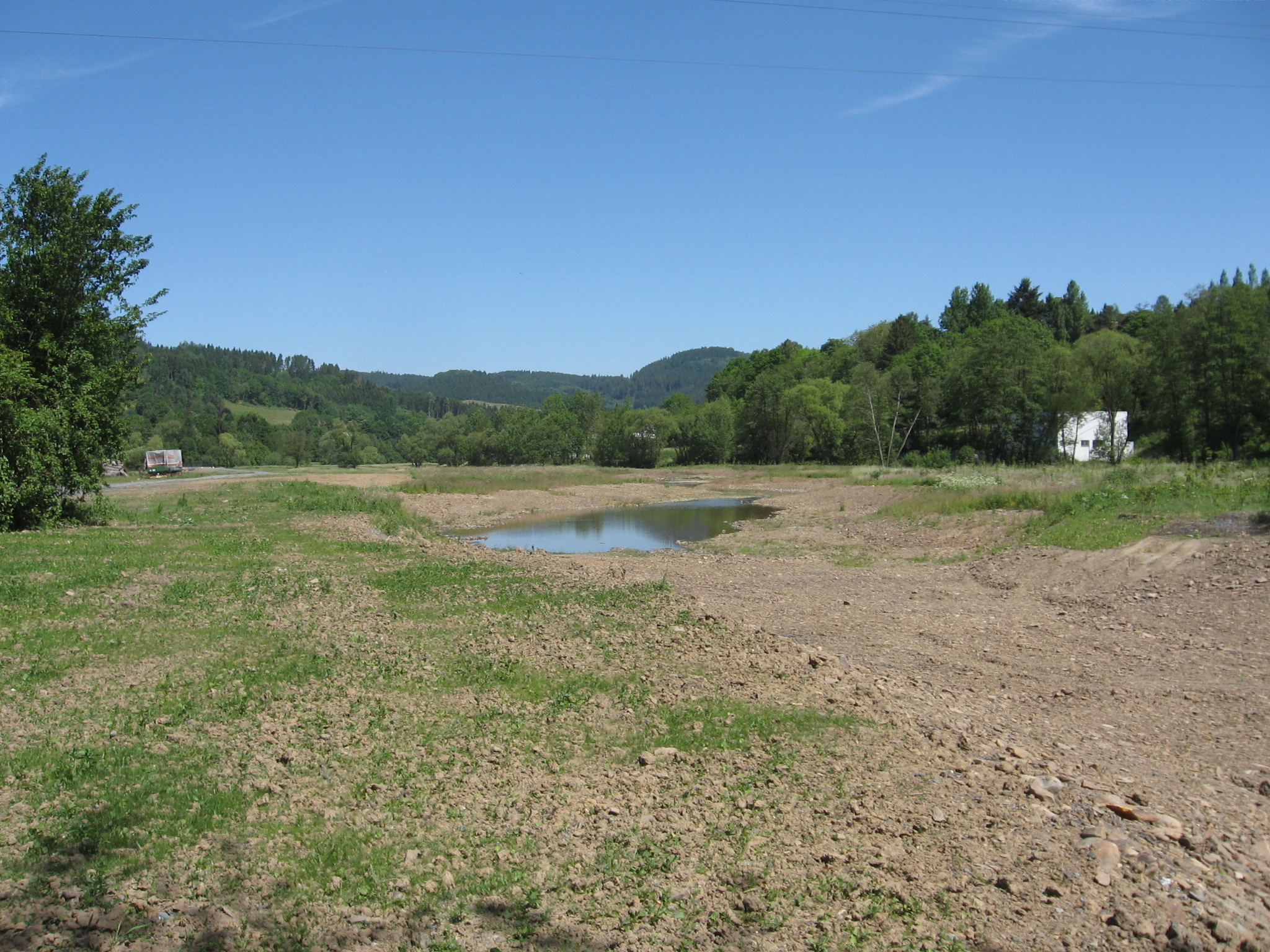 Ostteil vom Landschaftsschutzgebiet Sorpewiesen Lange Erlen nach Fertigstellung der Renaturierung Winter 2014/15.